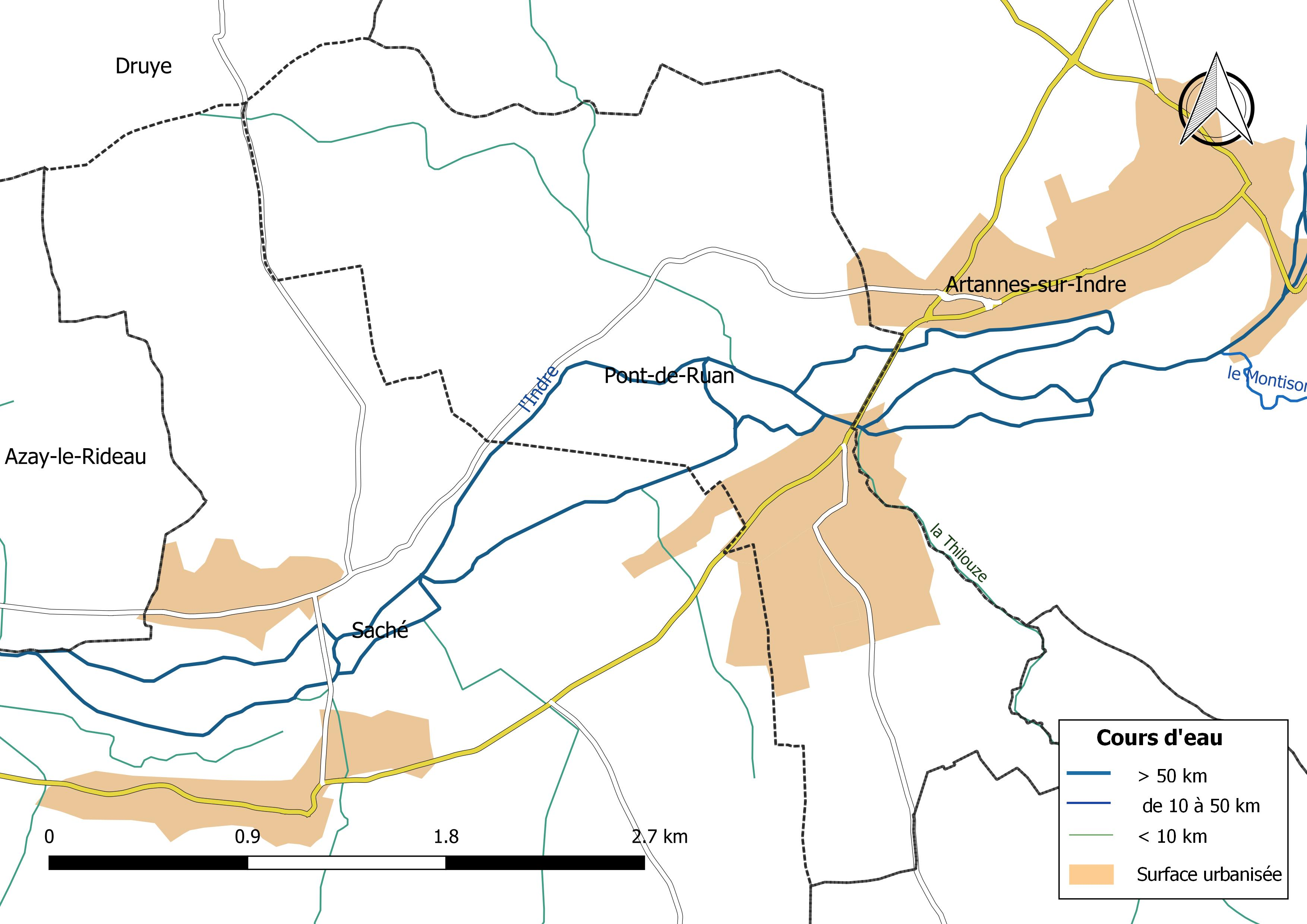 Carte du réseau hydrographique de la commune de Pont-de-Ruan (France).